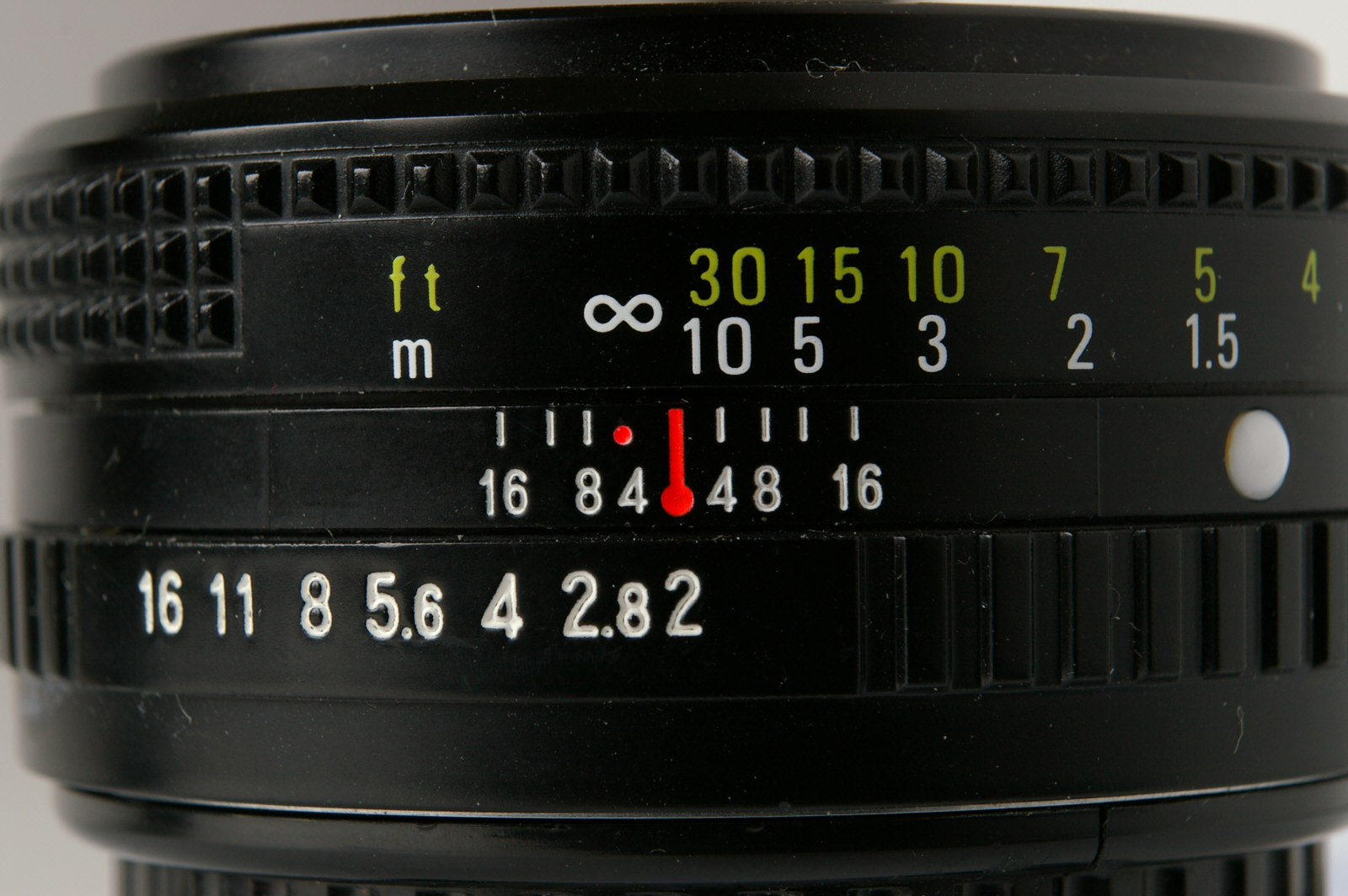 Schärfentiefenskala und Infrarotindex Ricoh 2/50 mm